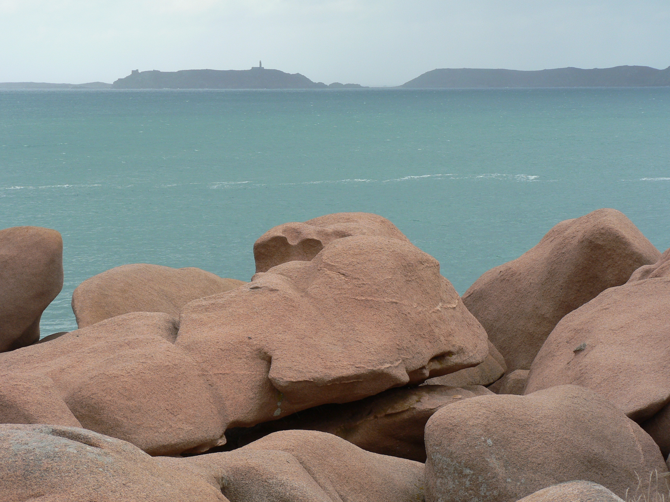 Côte de granit rose, Ploumanach, Bretagne (France) : Granit rose et vue sur les sept-îles (juste avant l'averse)